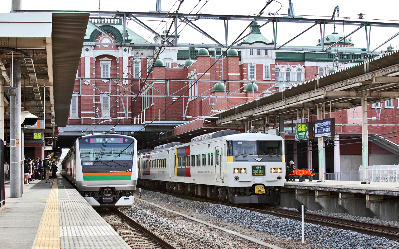 JR East Fukaya Station